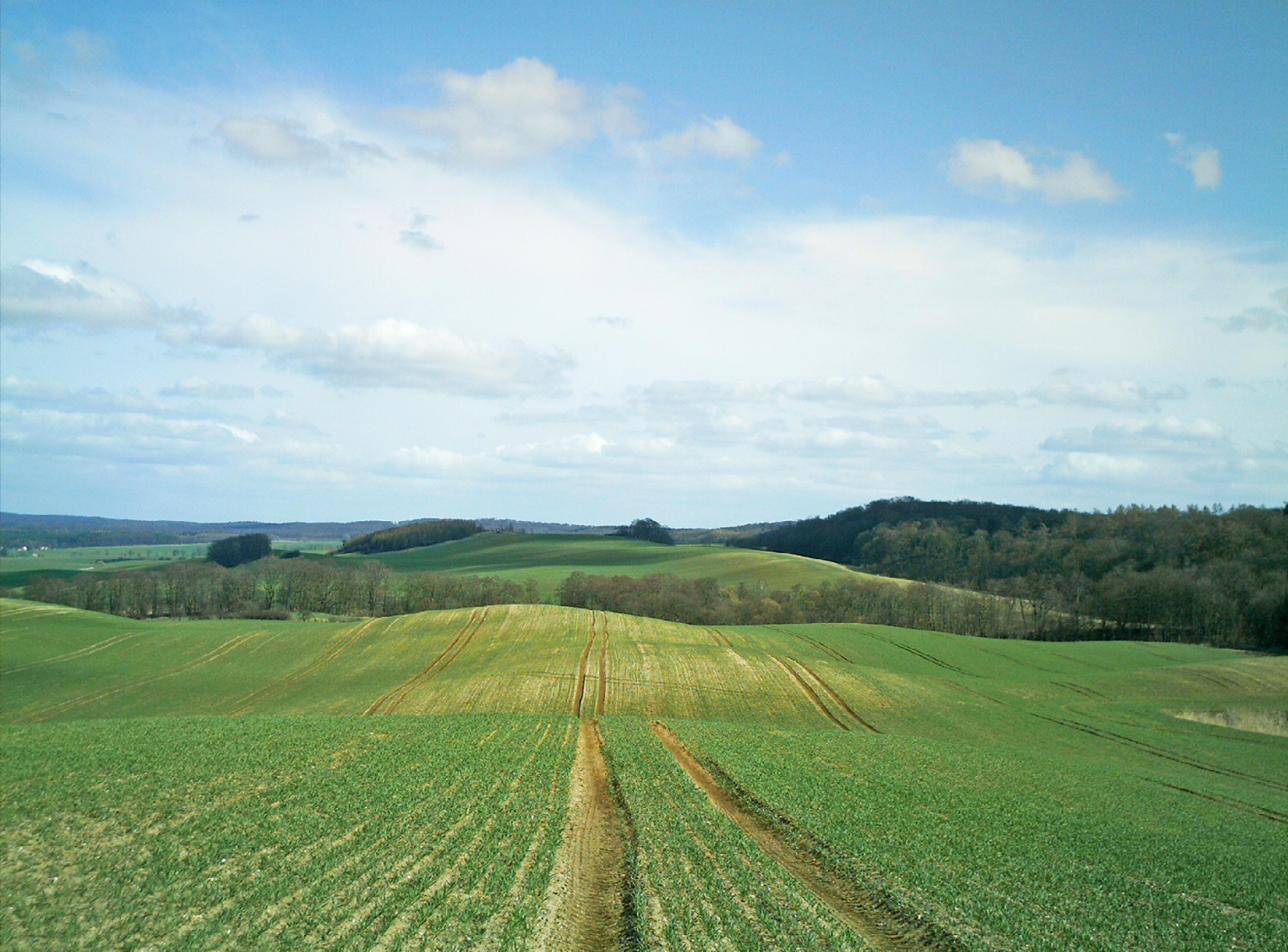 Der Fuchsberg bei Neuensund (85,9 m NN).